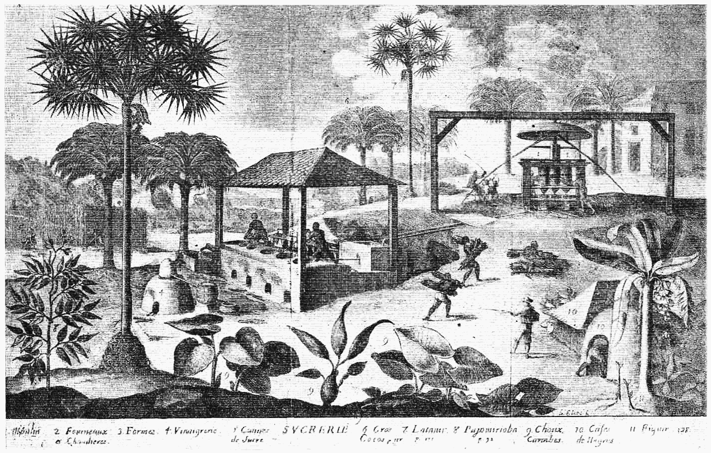 Une sucrerie à Saint-Domingue (Haiti).